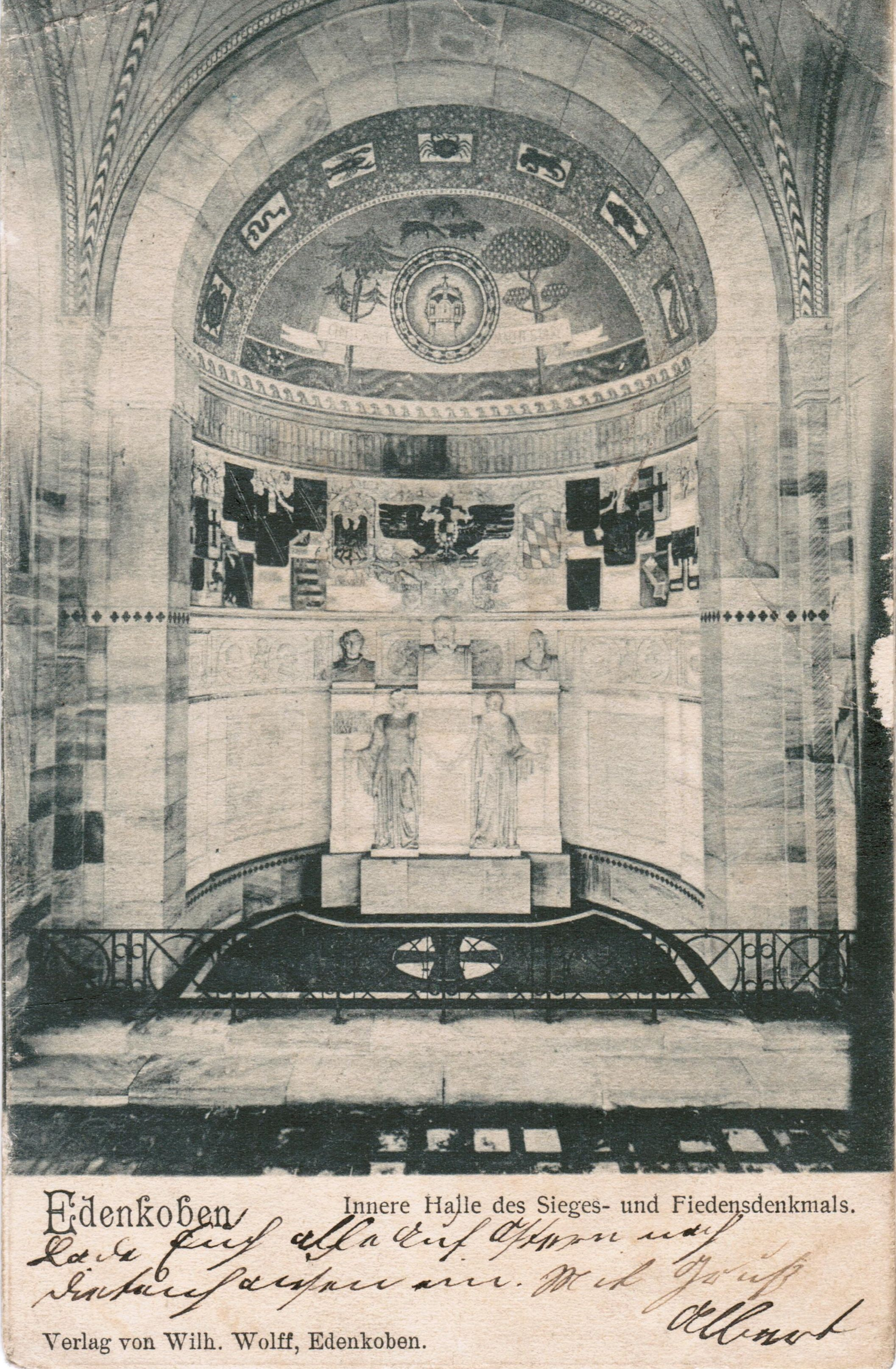 Sieges- und Friedensdenkmal in Edenkoben: Innere Halle